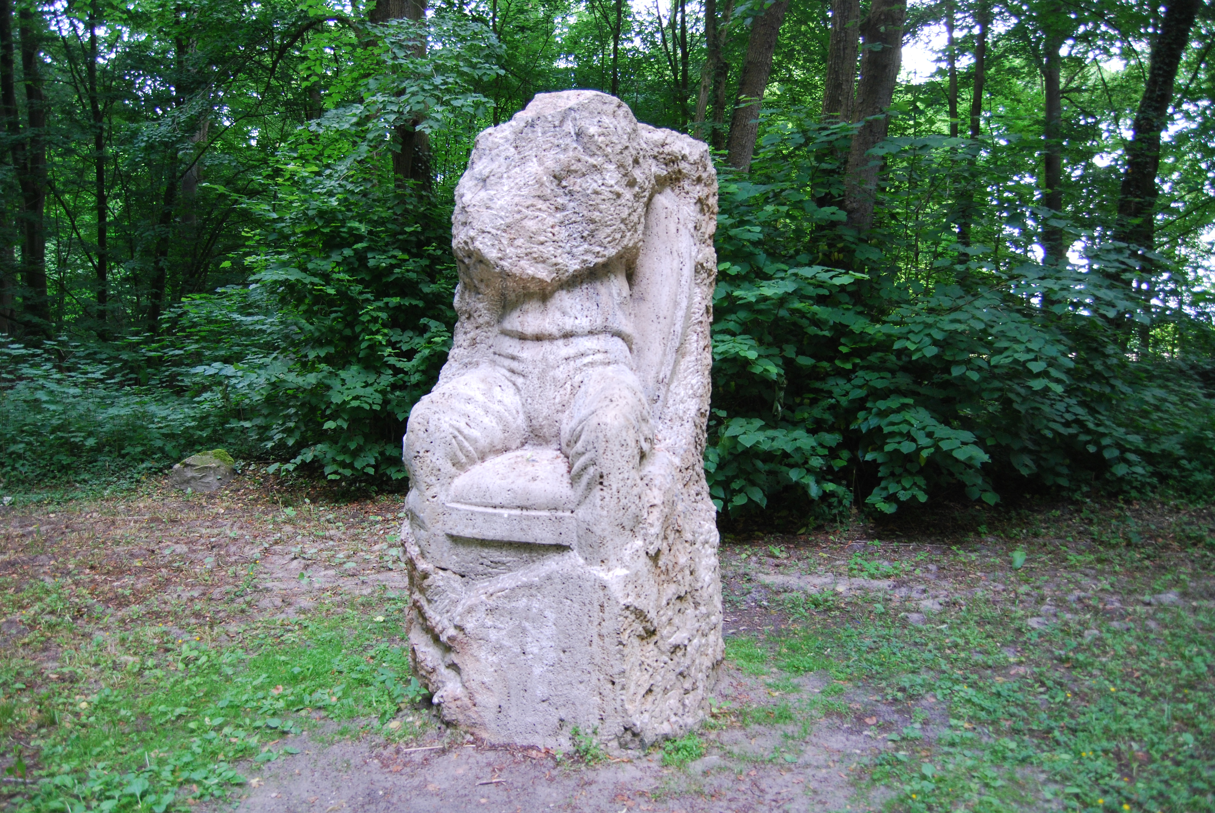 "Herrensitz" auf dem Wittenheimer Burgplatz in Westerstede von Norbert Marten, Konzeption: Norbert Marten und Christel Mandos-Feldmann. Das Werk befindet sich frei zugängig im öffentlichen Raum der Stadt Westerstede.